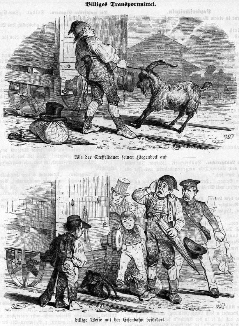 Karikatur "Billiges Transportmittel": Wie der Steffelbauer seinen Ziegenbock auf billige Weise mit der Eisenbahn befördert.